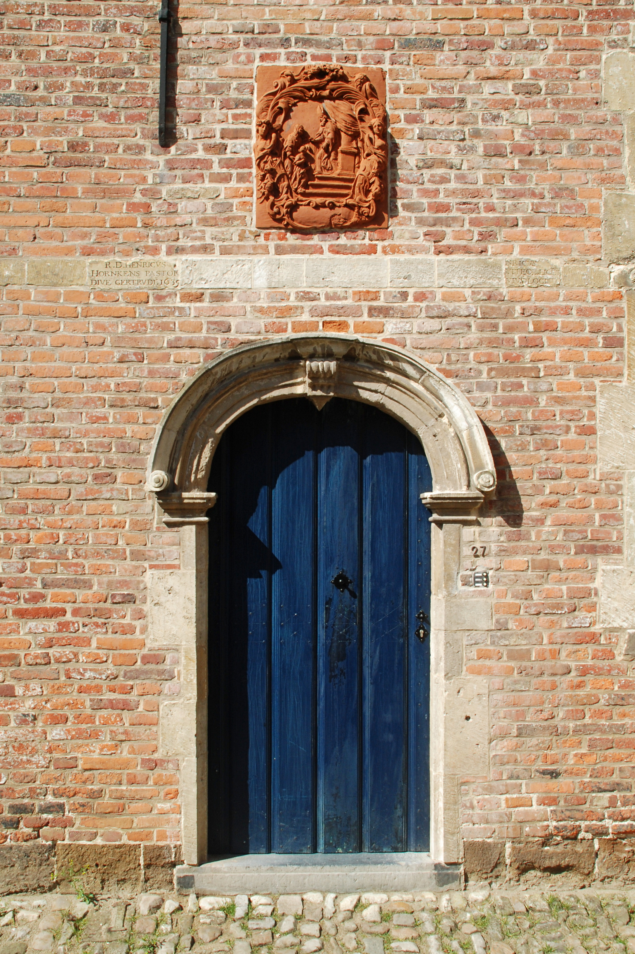 Belgique - Louvain - Grand Béguinage - Quartier espagnol n° 27 - couvent de la Vierge de la Présentation